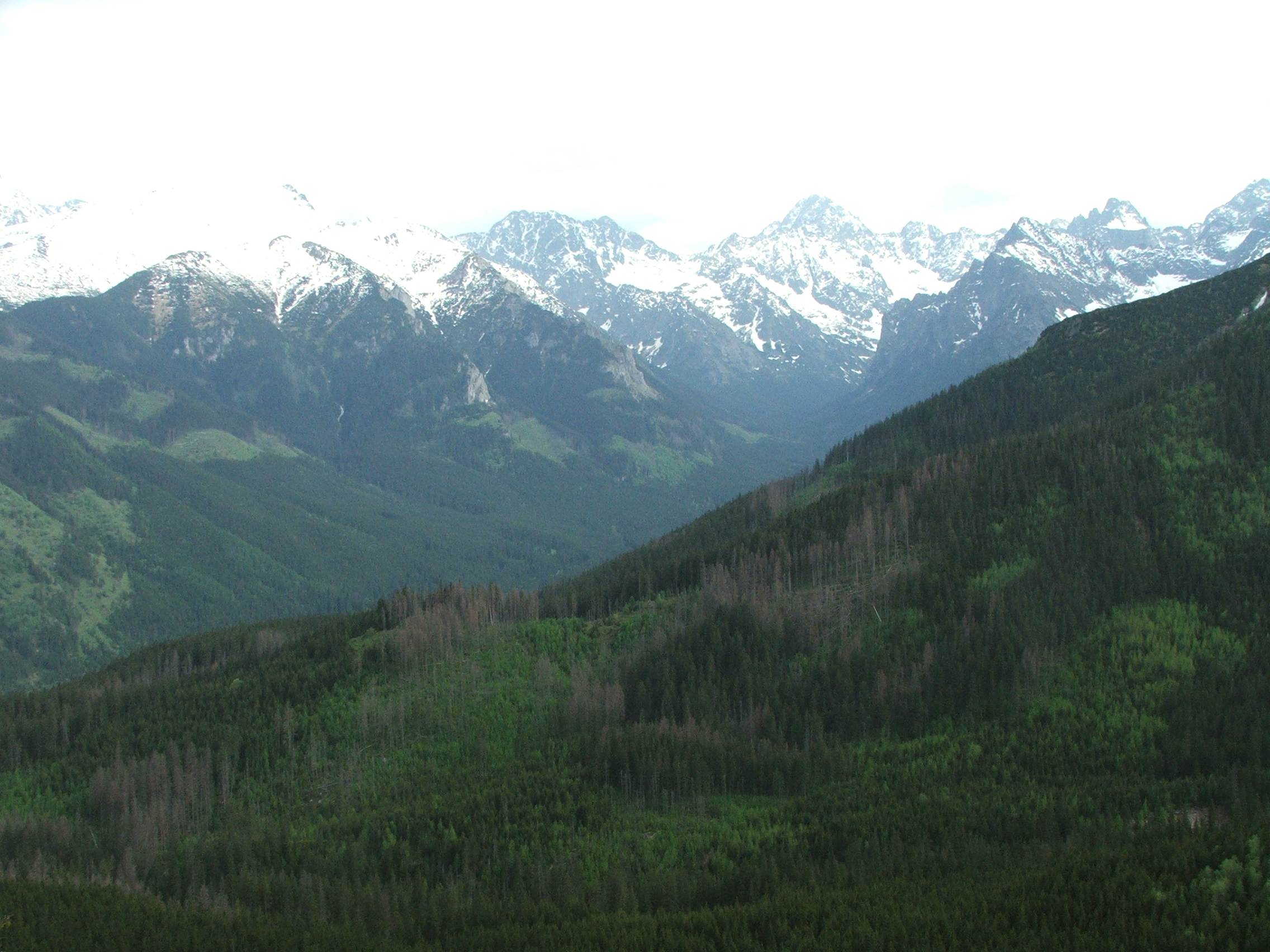 Widok na wschód z Gęsiej Szyi w Tatrach